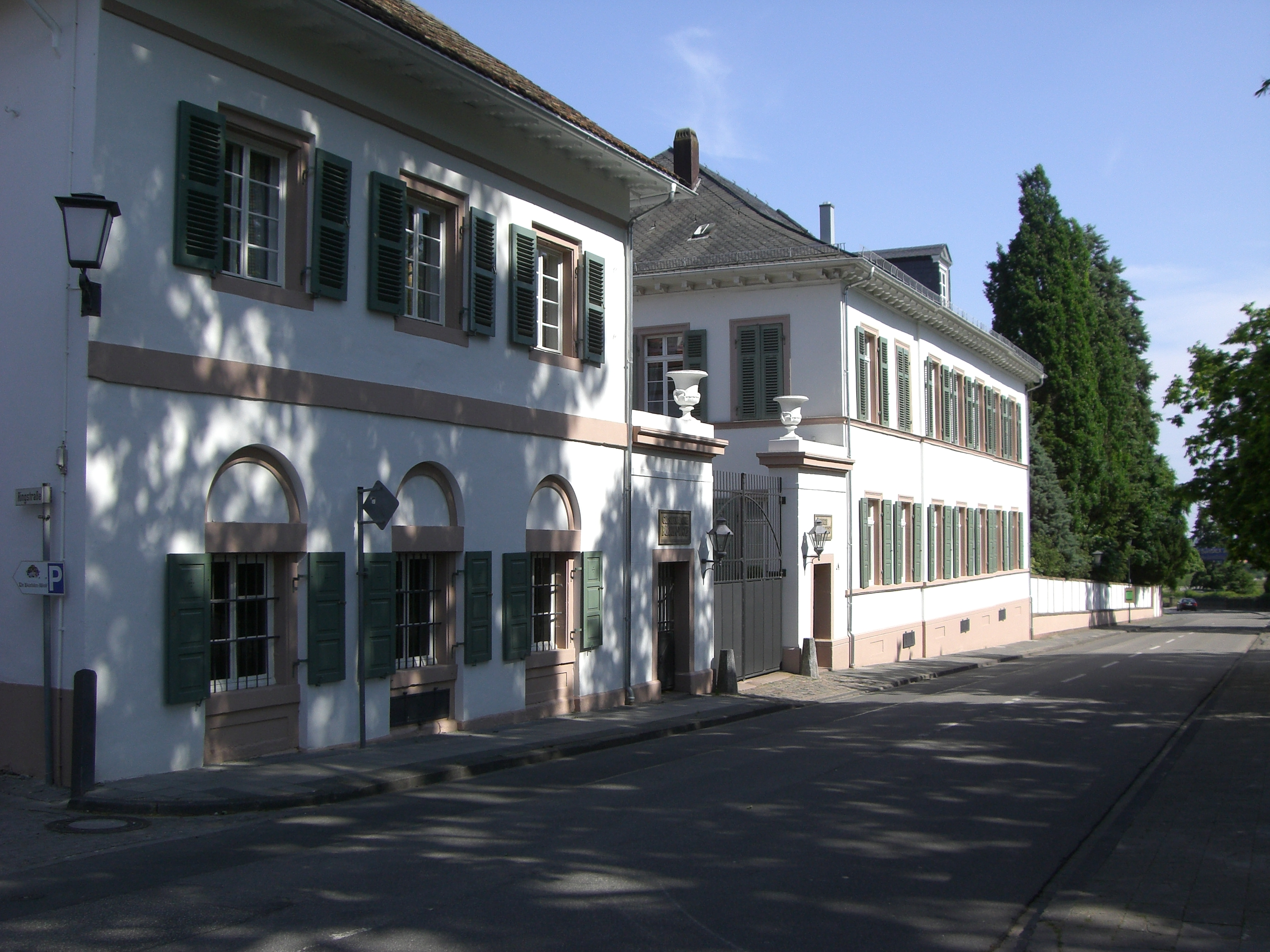 Das Gutshaus des Weinguts Dr. Bürklin-Wolf in Wachenheim an der Weinstraße